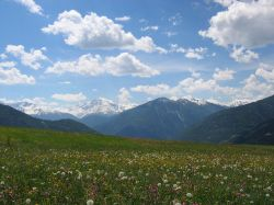 markus moriggl